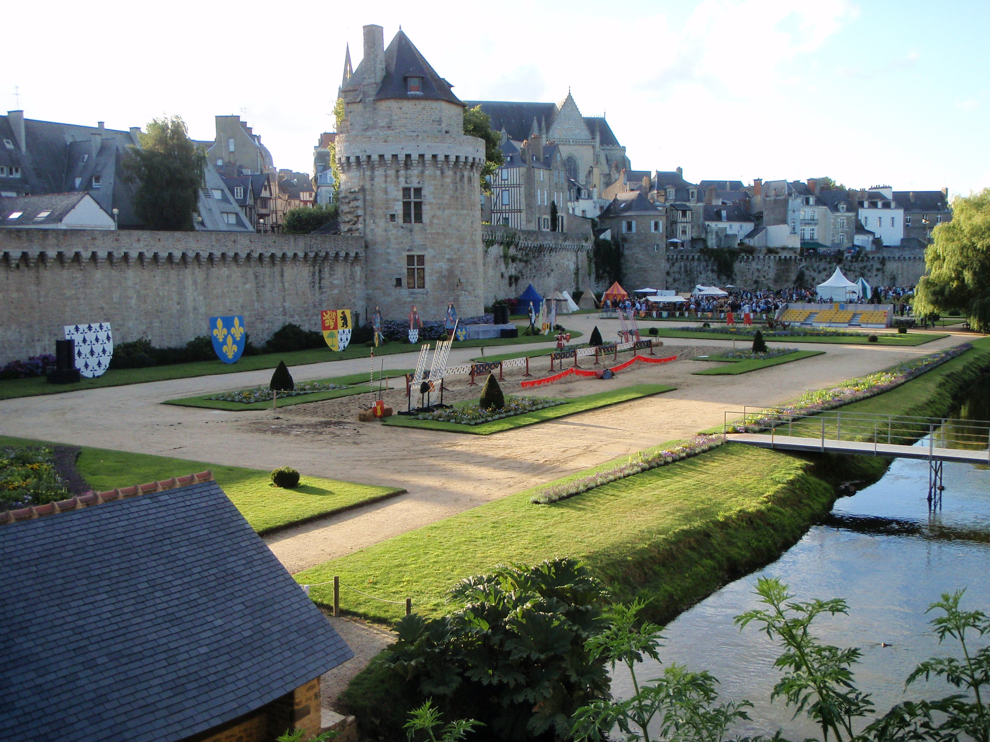 Remparts de Vannes (Morbihan-France) durant les fêtes historiques de 2009